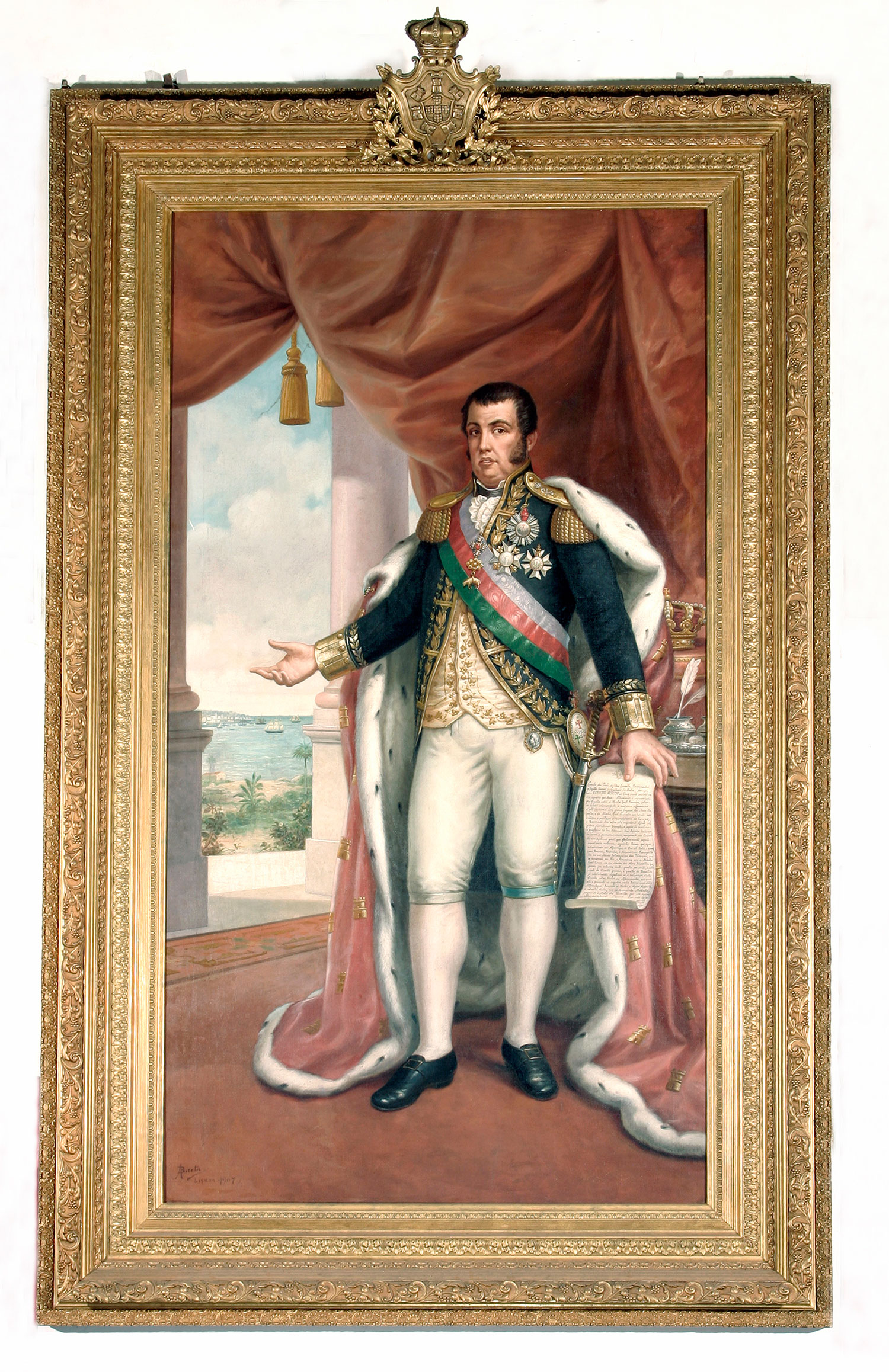 Óleo de A. Baeta retratando Dom João VI com o decreto da abertura dos portos.Acervo da Associação Comercial da Bahia, reproduzido por Josué Montello em 1972 no volume I da coleção HISTÓRIA DA INDEPENDÊNCIA DO BRASIL, edição comemorativa do sesquicentenário da idependência, editora Rideel/casa do livro, impressa no Rio de Janeiro.